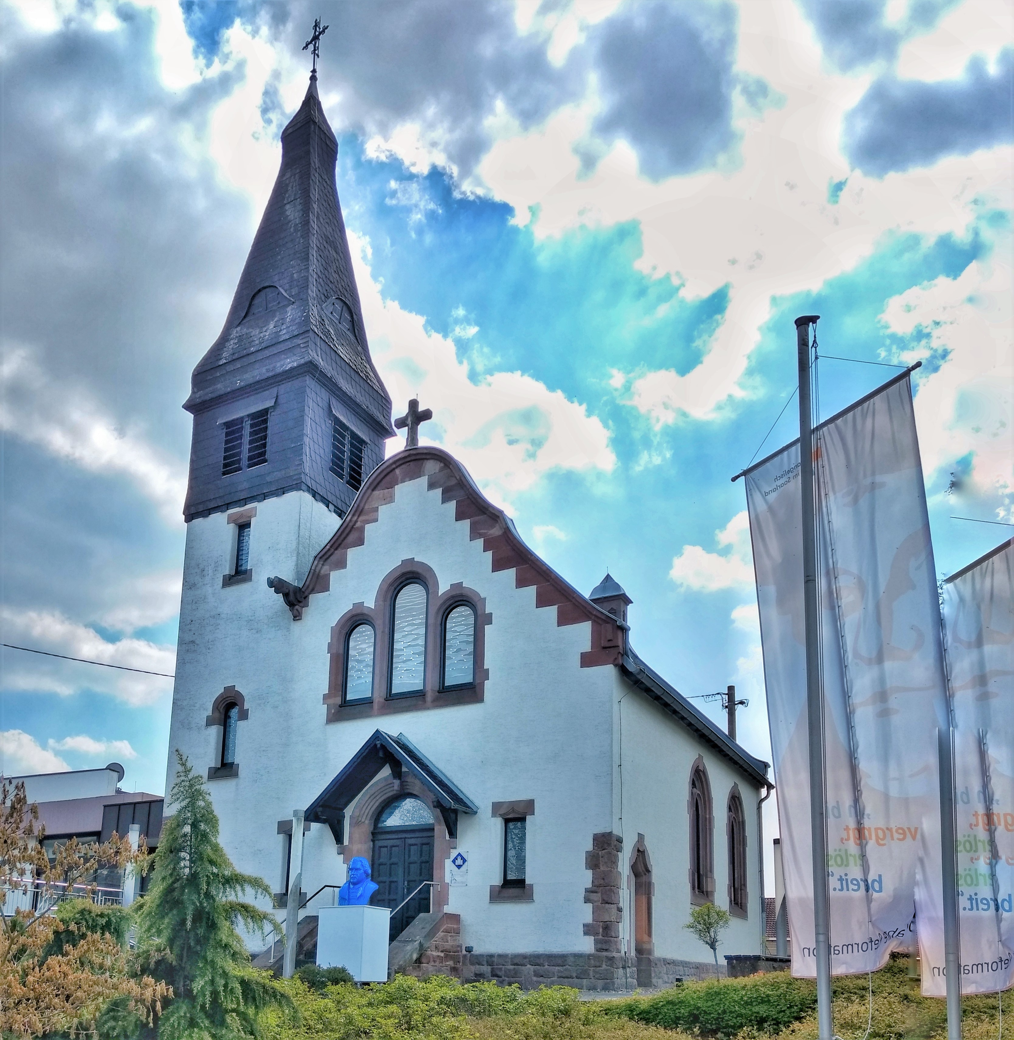 Friedhof Lebach